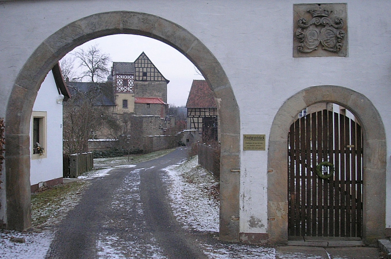 Burg Lichtenstein, Südburg (Gemeinde Pfarrweisach, Landkreis Haßberge, Unterfranken). Die Südburg durch das Tor der Vorburg. Eigene Aufnahme, Dez. 2007 / Lichtenstein castle near Pfarrweisach (Lower Franconia, Germany). Southern castle, seen through the gate of the bailey. Own photo, Dec. 2007